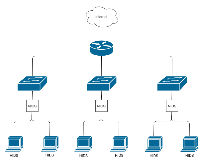 topologie NIDS HIDS